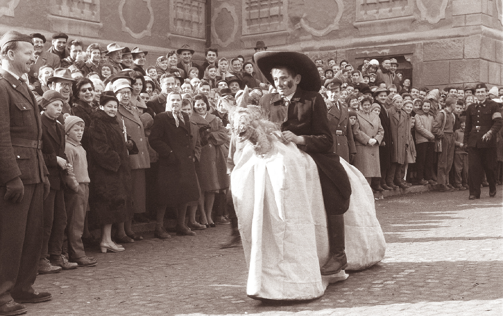 Ptujski pustni karneval in kurentovanje